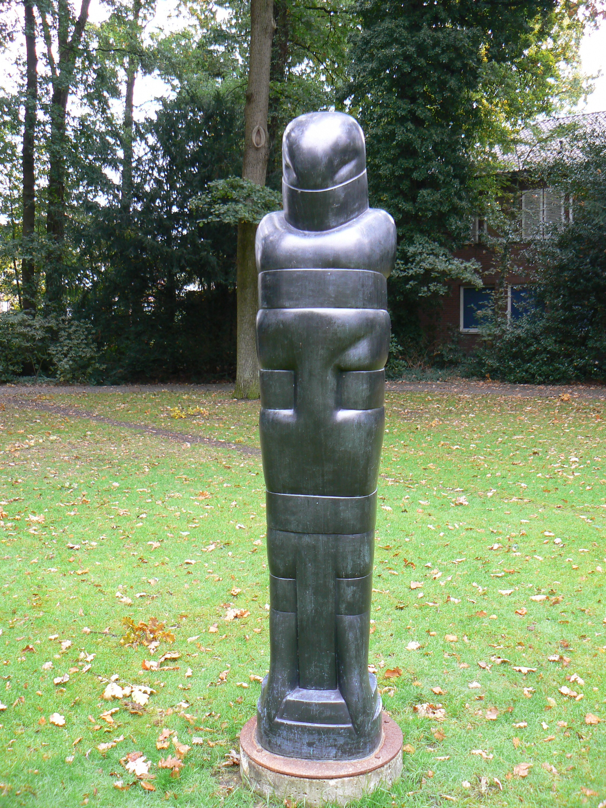 sculpture Grosse stehende Figur (1971) by Hede Bühl in Nordhorn/Germany